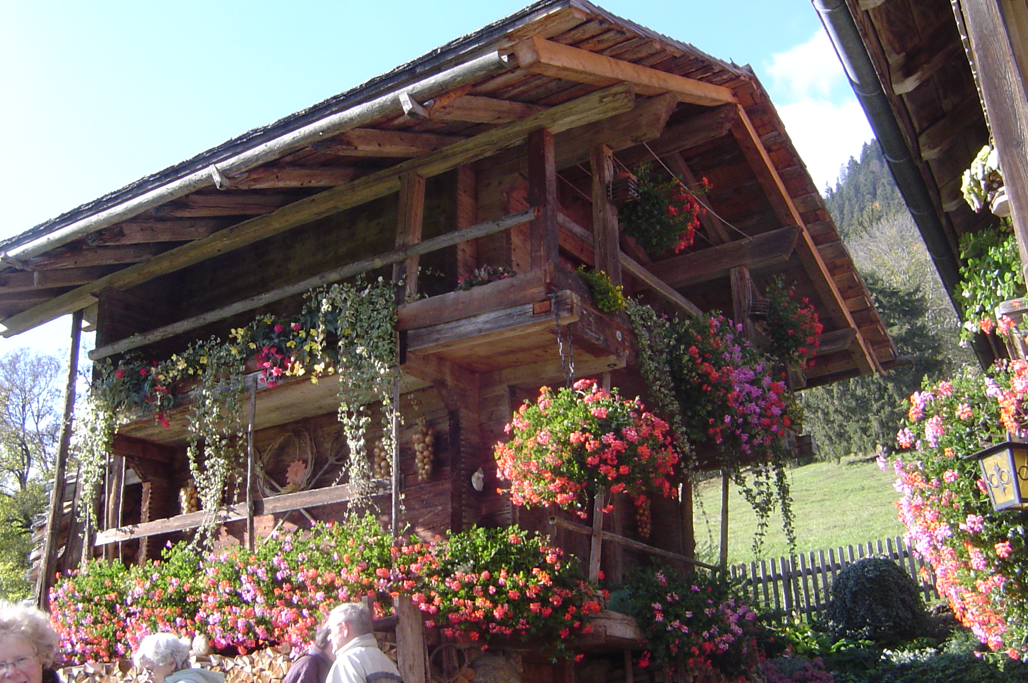 Barn today